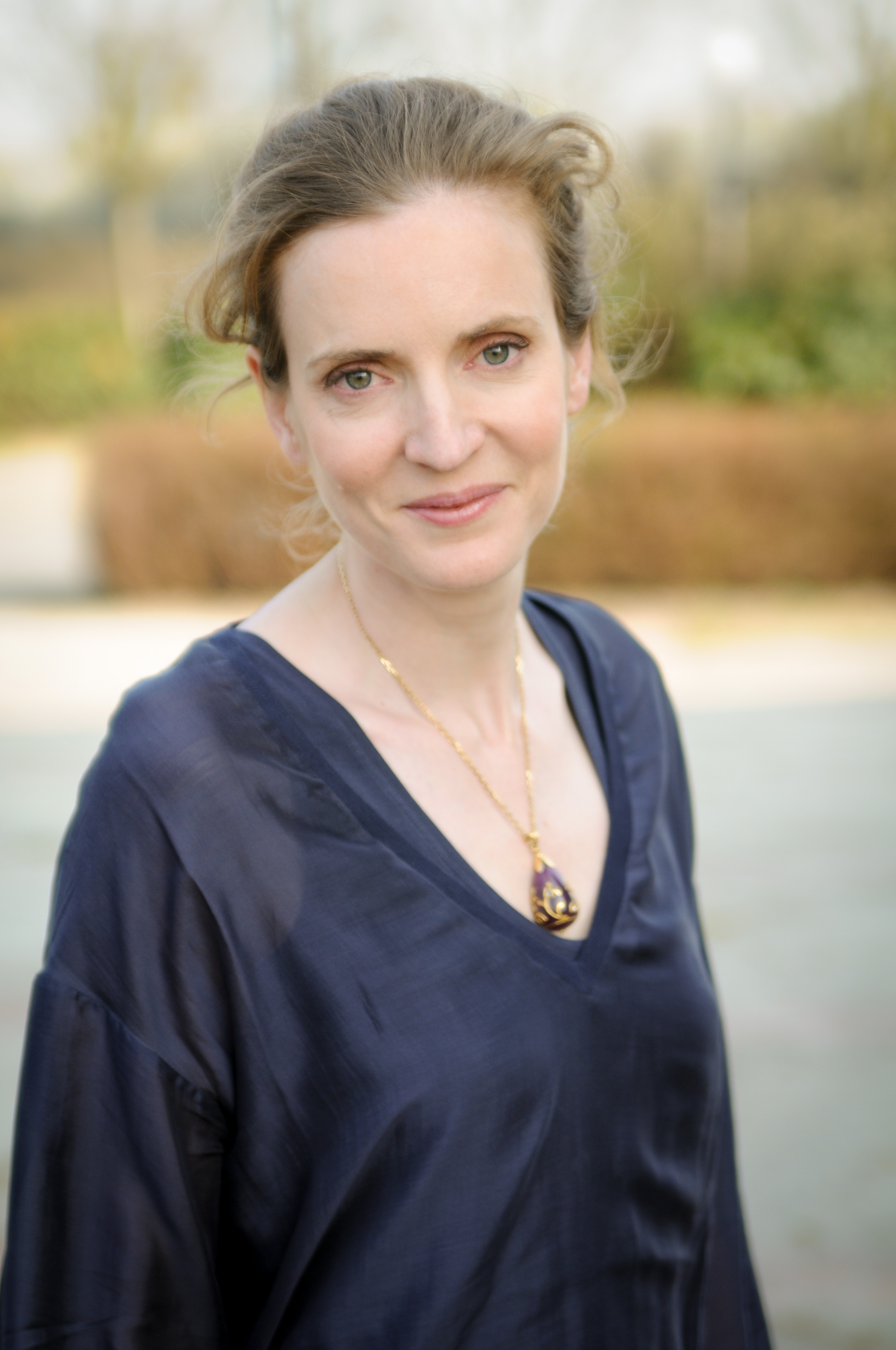 Portrait de Nathalie Kosciusko-Morizet utilisé comme affiche pour sa campagne des élections législatives de 2012.